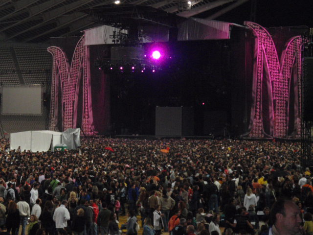 H σκηνή της Sticky & Sweet Tour στο Ολυμπιακο Στάδιο στην Αθήνα στις 27 Σεπτεμβρίου 2008.